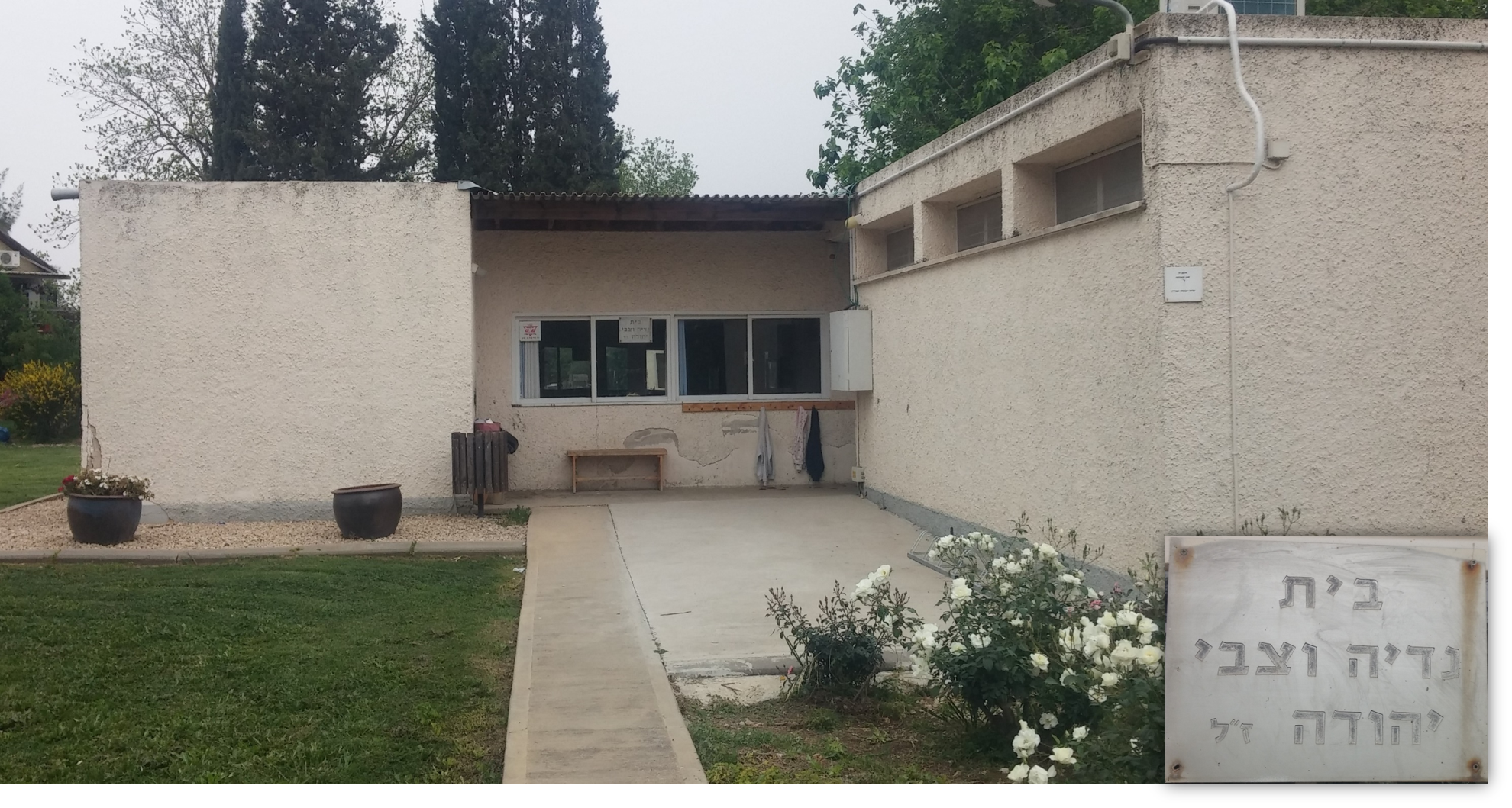 בית נדיה וצבי יהודה בנהלל כיום בשנת 2016